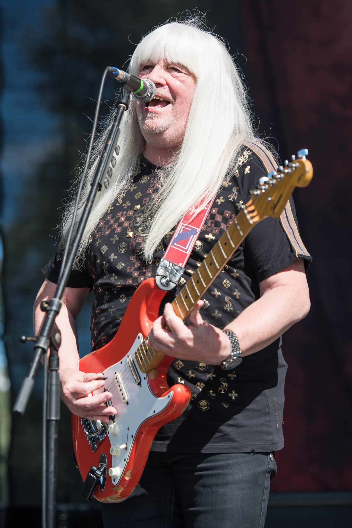 Andy Scott,Brombachsee,Concertbüro Franken,Festival,Konzert,Lieder am See,Livekonzert,Livemusik,Musik,The Sweet